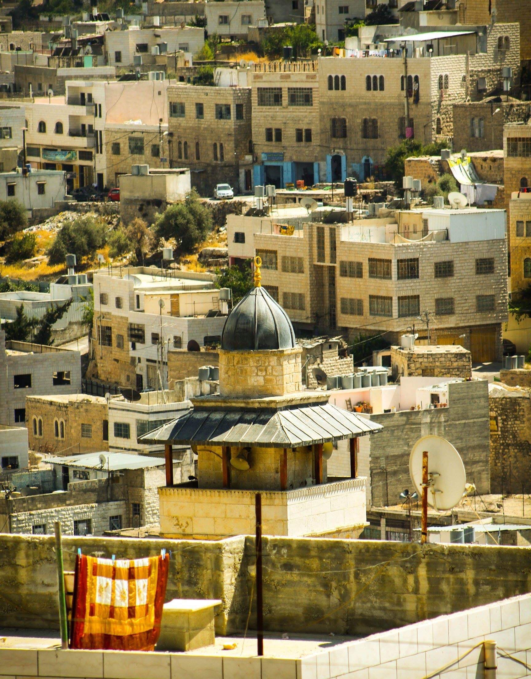 صورة عن البلدة القديمة ومأذنة الحرم الابراهيمي بالخليل.